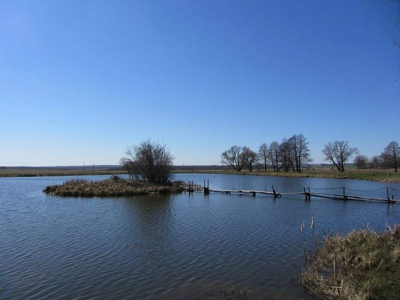 Рап’ёва. Сядзіба Мікульскіх